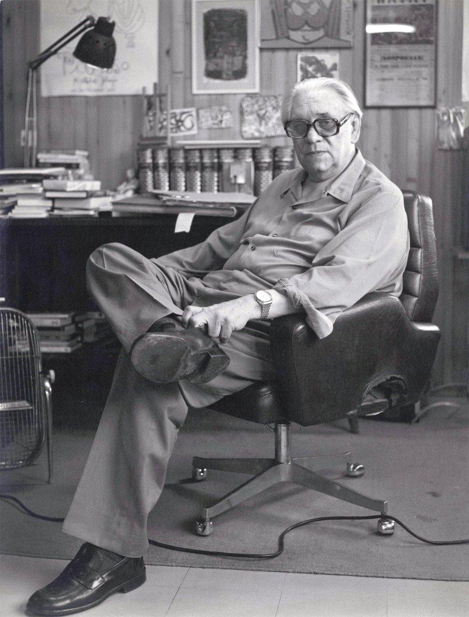 Luís Seoane, decembro de 1978, Buenos Aires